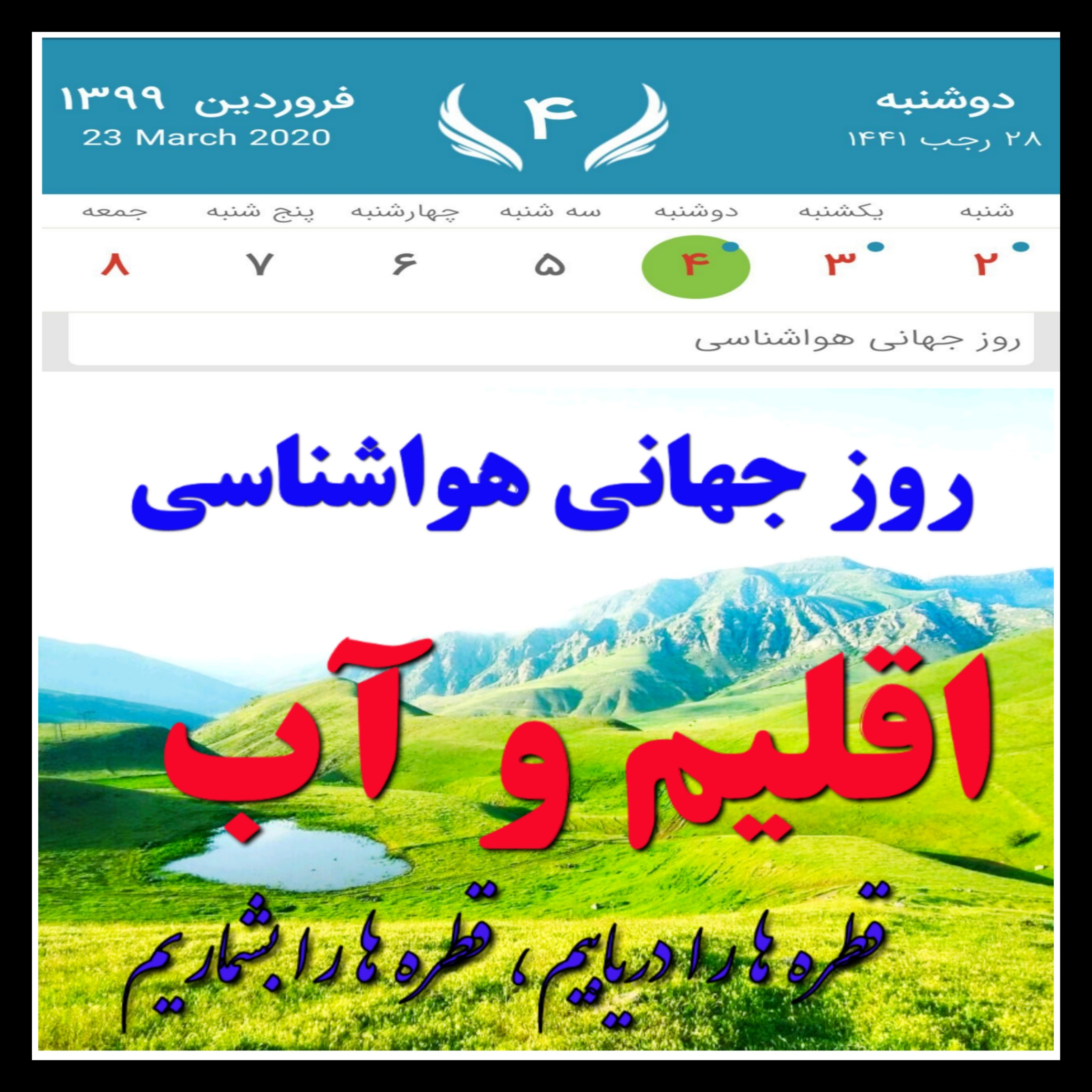 روز جهانی هواشناسی 2020